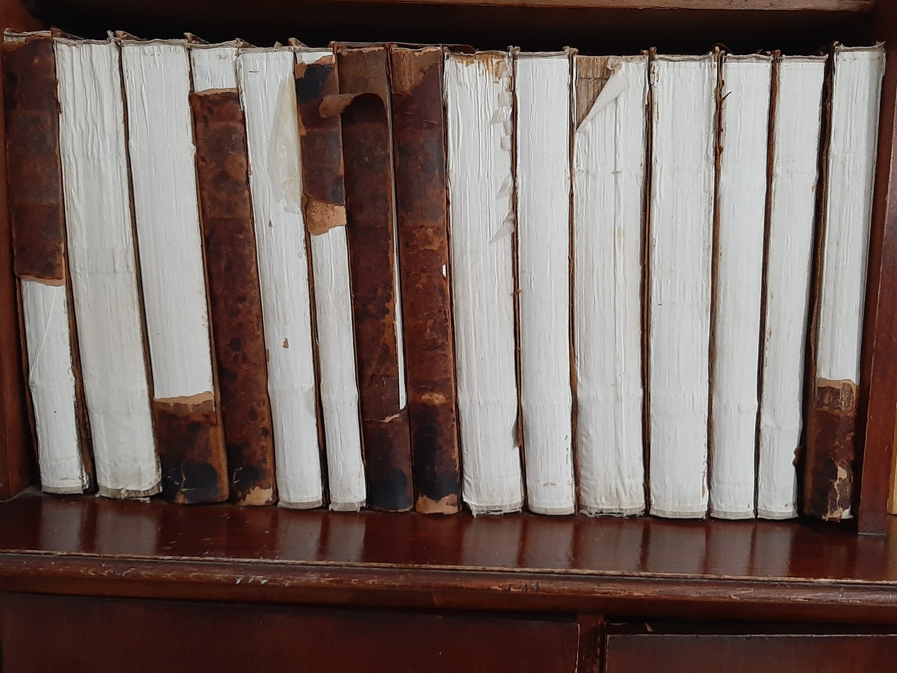 גמרות שנקברו בבית הקרבות של מגנצה בתקופת השואה, הוצאו לאחר מכן בידי בני המשפחה והועלו ארצה